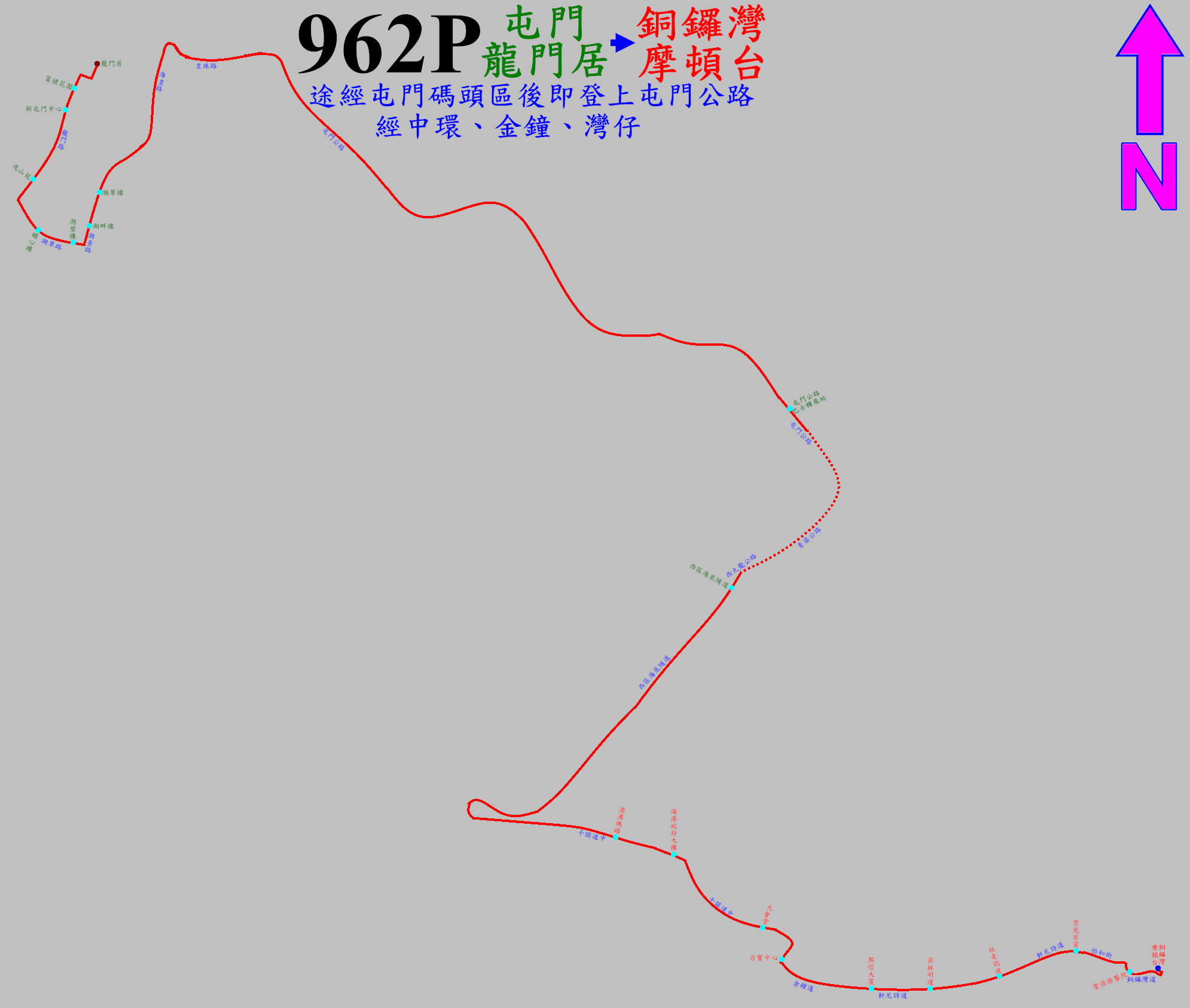 中文（香港）: 過海隧巴962P線的走線圖